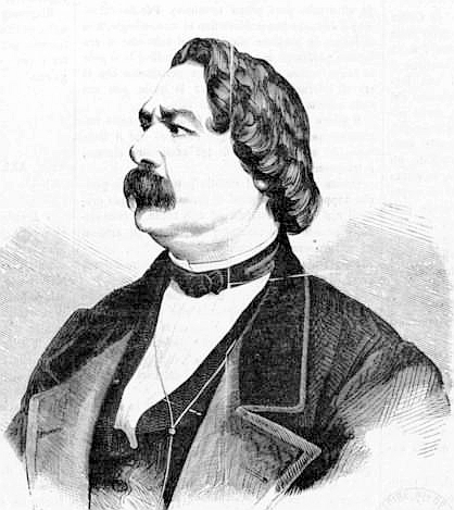 "Disegno di Francesco Gonin, da una fotografia."